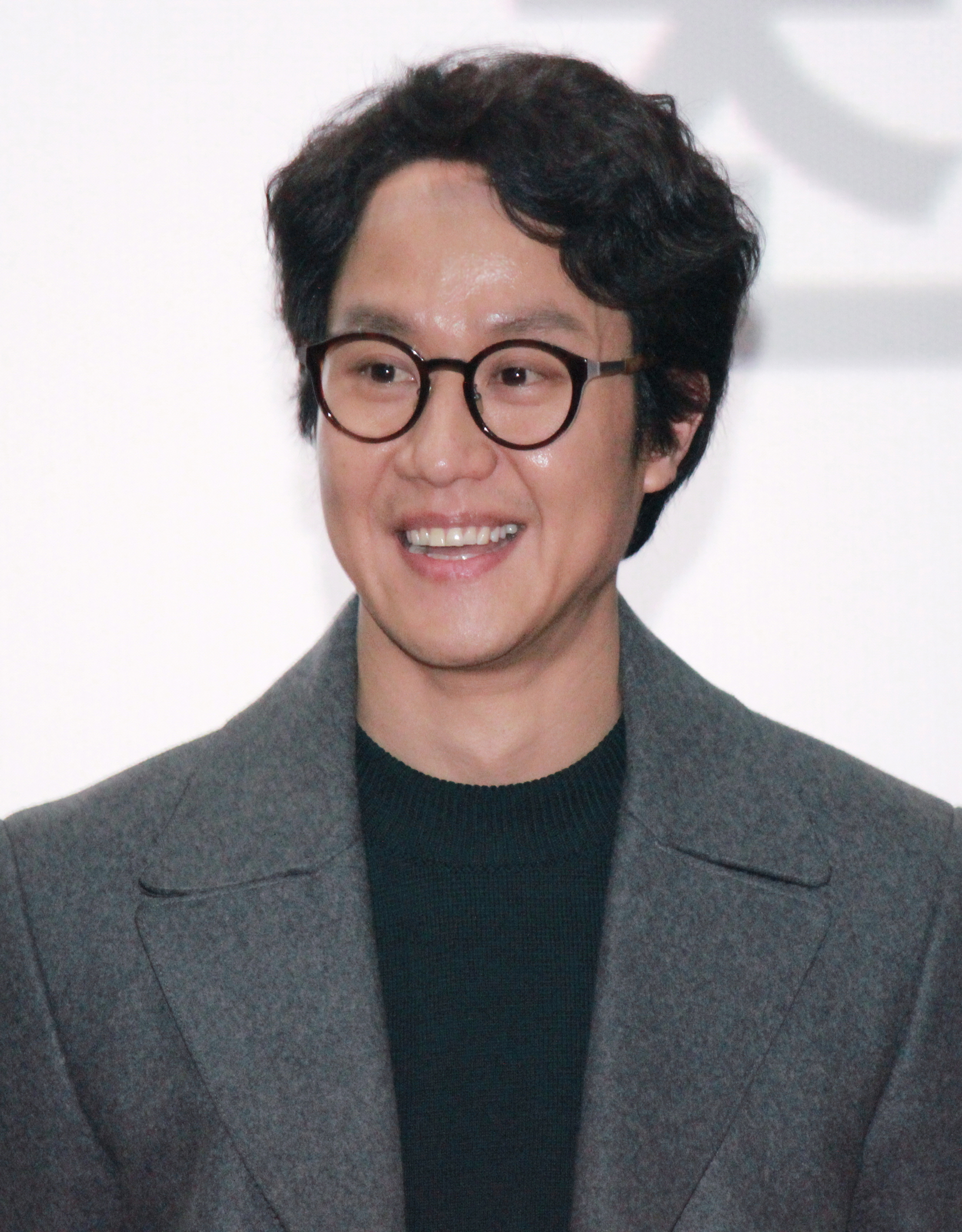 150215 쎄시봉 부산 무대인사 정우